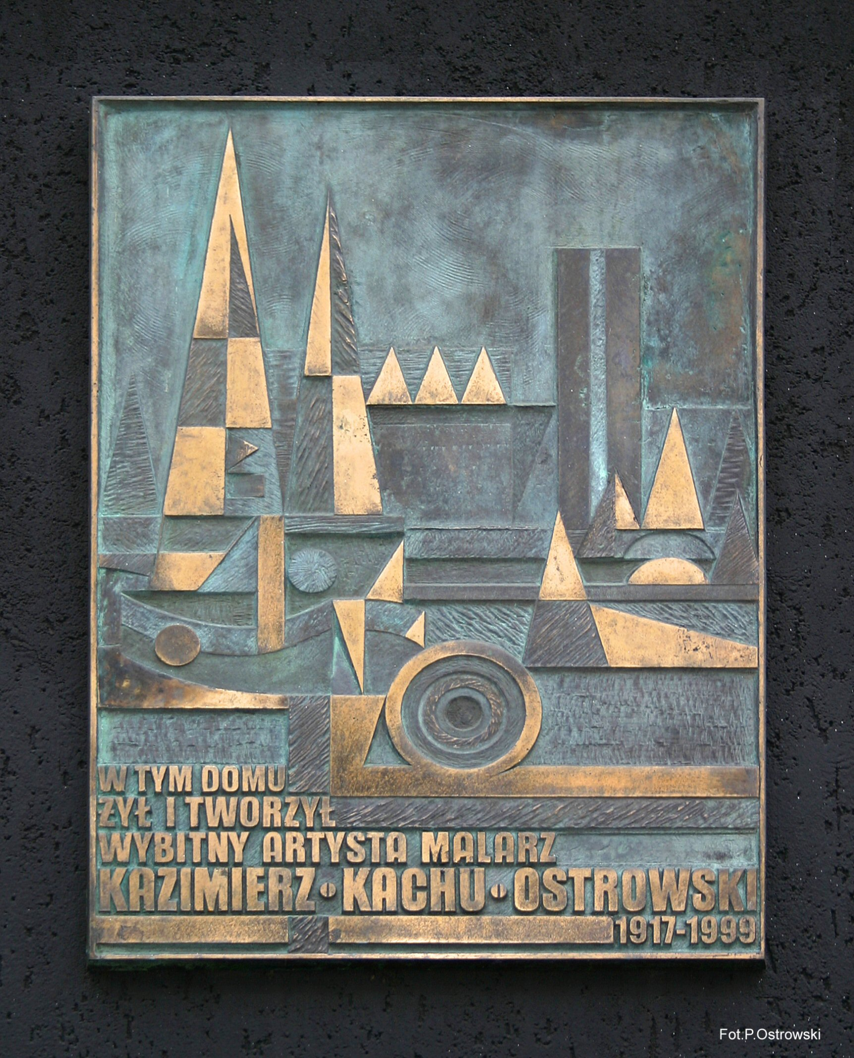 Tablica pamiątkowa na domu w Gdyni ul. Abrahama 62.